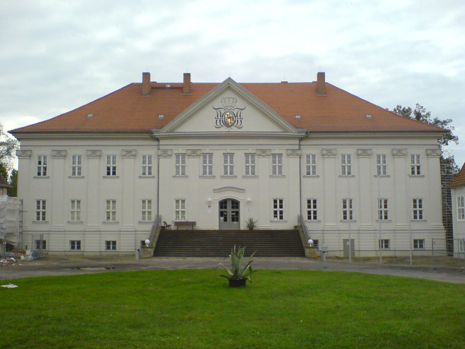 Schloss Hohenzieritz, Hofseite